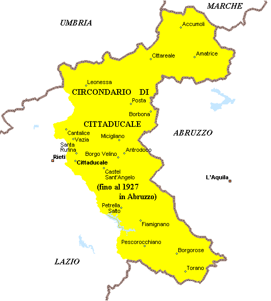 Cartina dell'ex circondario di Cittaducale